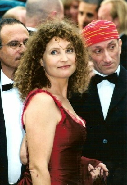 Valérie Mairesse et Jean-François Dérec au festival de Cannes